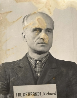 Richard Hermann Hildebrandt (* 13. März 1897 in Worms; † 10. März 1952 in Danzig oder 10. März 1951 in Bydgoszcz/Bromberg) war ein deutscher Politiker (NSDAP) und SS-Führer. Hildebrandt war Reichstagsabgeordneter, SS-Obergruppenführer (1942) und General der Waffen-SS. Er wurde nach dem Zweiten Weltkrieg als Kriegsverbrecher hingerichtet.